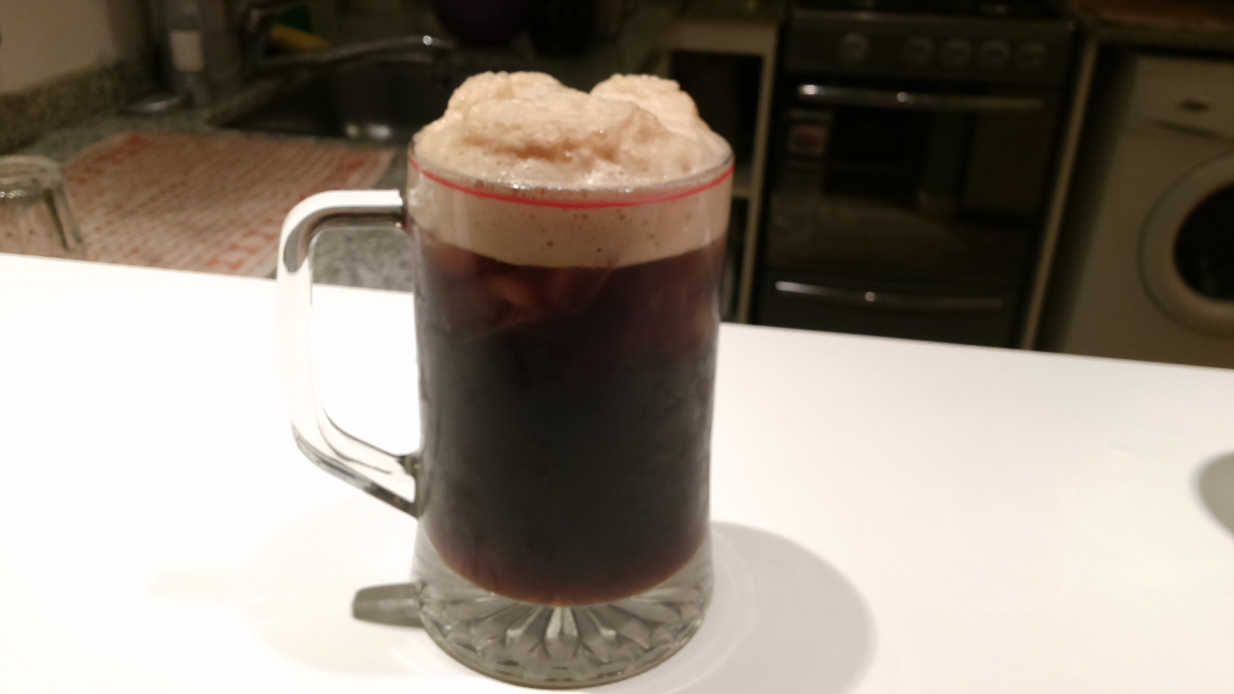 Imagen de la típica combinación del Fernet con Coca.